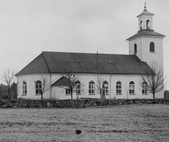 Åkers kyrka